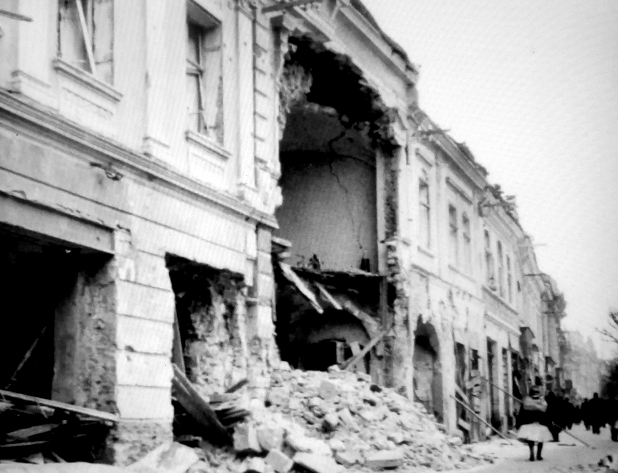 Digitalizovaný dobový obrázok z tlače, vyhotovený v decembri 1944 po bombardovaní mesta Prešov. Prešov 20.12.1944 v čase od 18.55 do 20.15 hod. bombardovalo 150 lietadiel sovietskej Červenej armády. Celkom zahynulo asi 450 ľudí a poškodených alebo zničených bolo 1 700 budov.